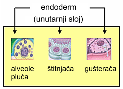 Endoderm